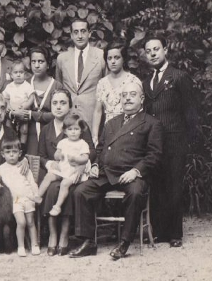 J.Mª. García-Blanco Oyarzabal (de pie, centro) con su familia, suegro (sentado) y cuñados.